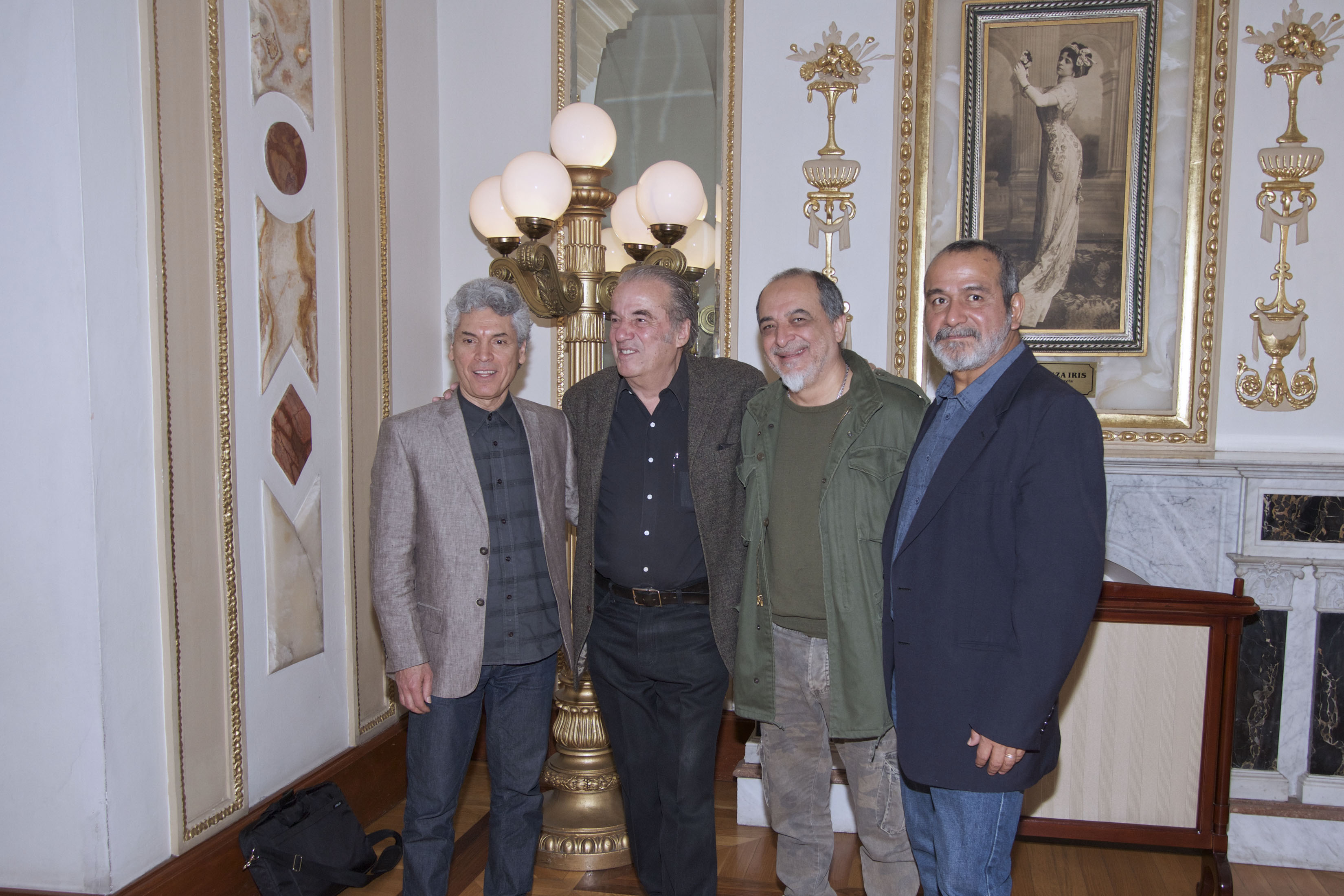 Lunes 14 de marzo de 2016. En el foyer del Teatro de la Ciudad Esperanza Iris se realizó la conferencia de prensa para dar los pormenores del espectáculo Oscar Chávez, a 50 años de Los Caifanes, Homenaje a Juan Ibáñez, que se presentará el domingo 20 de marzo, en el marco del 32 Festival del Centro Histórico con la participación de Jaime López, David Haro, Rafael Mendoza y Oscar Chávez, quienes estuvieron acompañados por Ángel Ancona y Julio Blasina. Fotografía: Milton Martínez / Secretaría de Cultura CDMX.